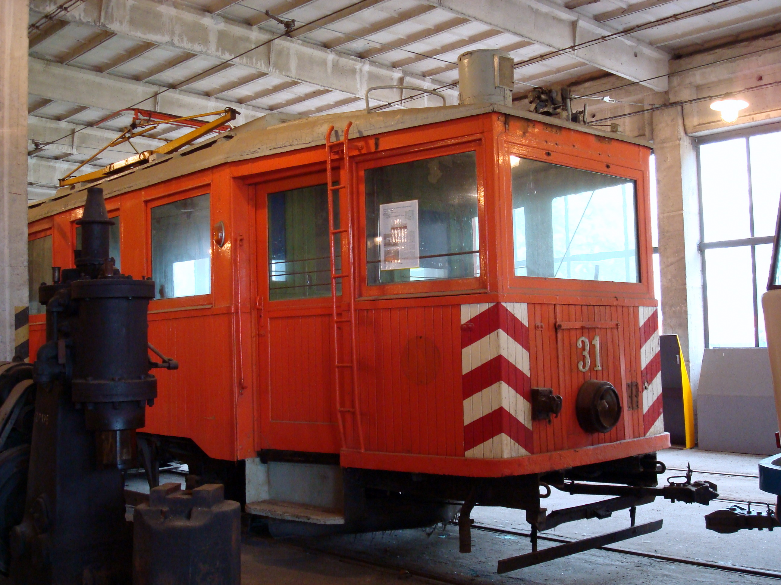 Ostravská muzejní noc 15.05.2010